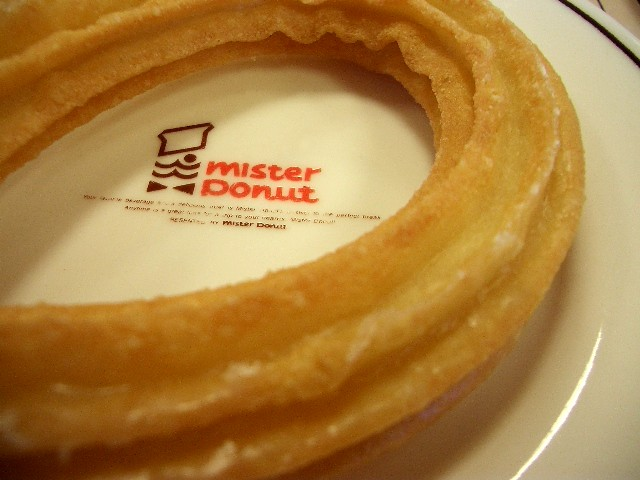 久しぶりのドーナツ写真（笑）